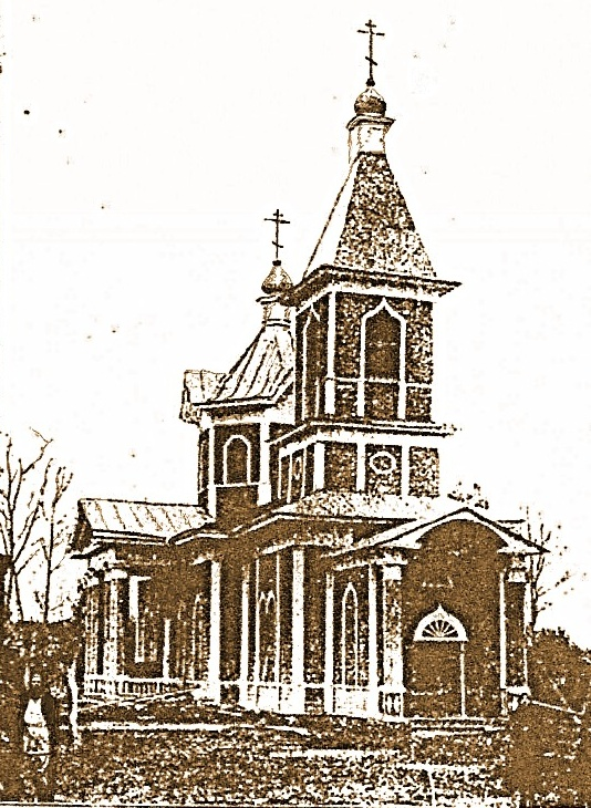 Деревянный храм во имя Казанской иконы Божией Матери. Ключегорский Казанско-Богородицкого монастырь, Бузулукский уезд Самарской губернии